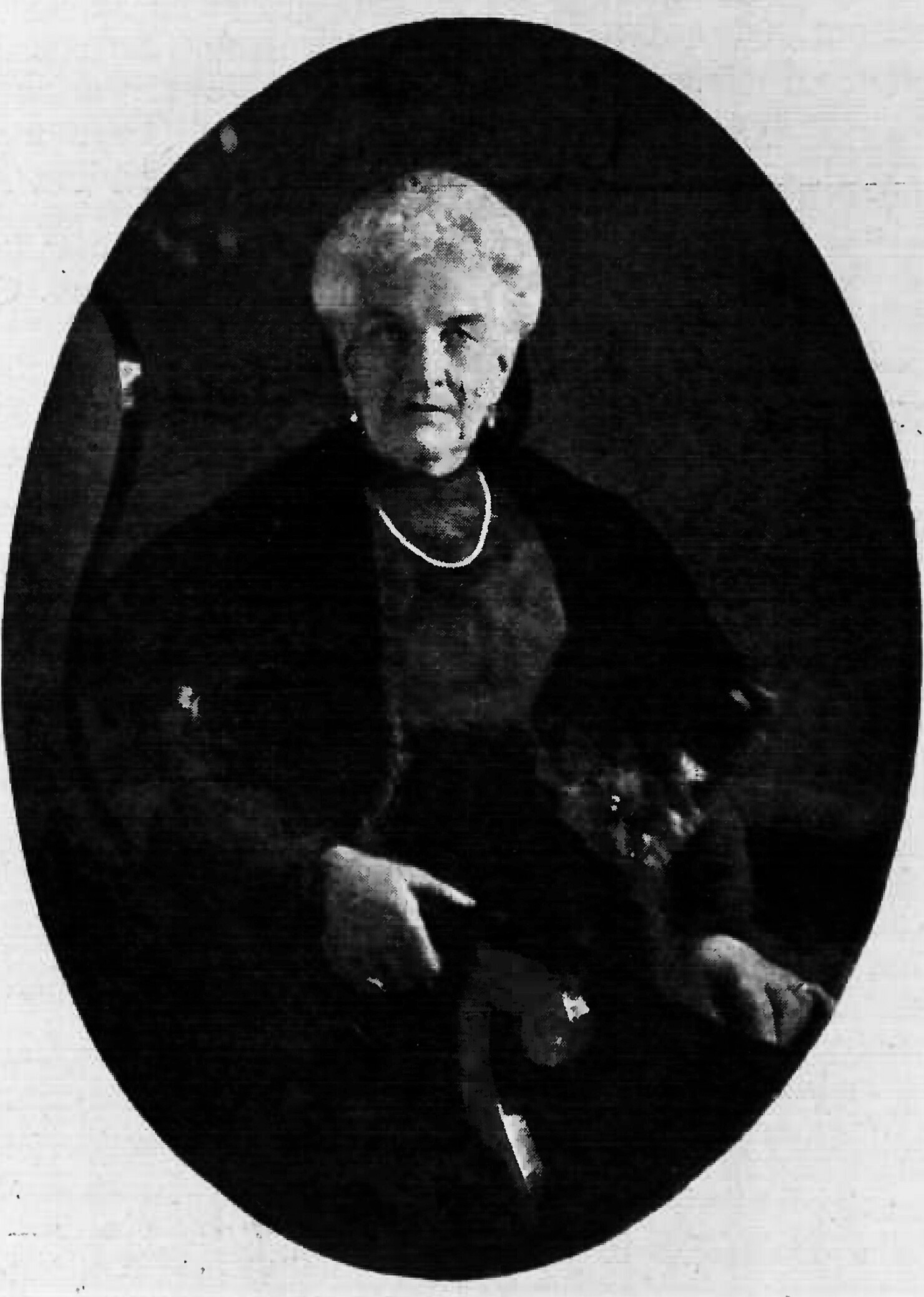 Ida Boy-Ed zu ihrem 70. Geburtstag.